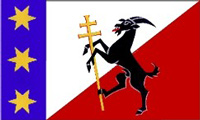 Banner von Rokytnice